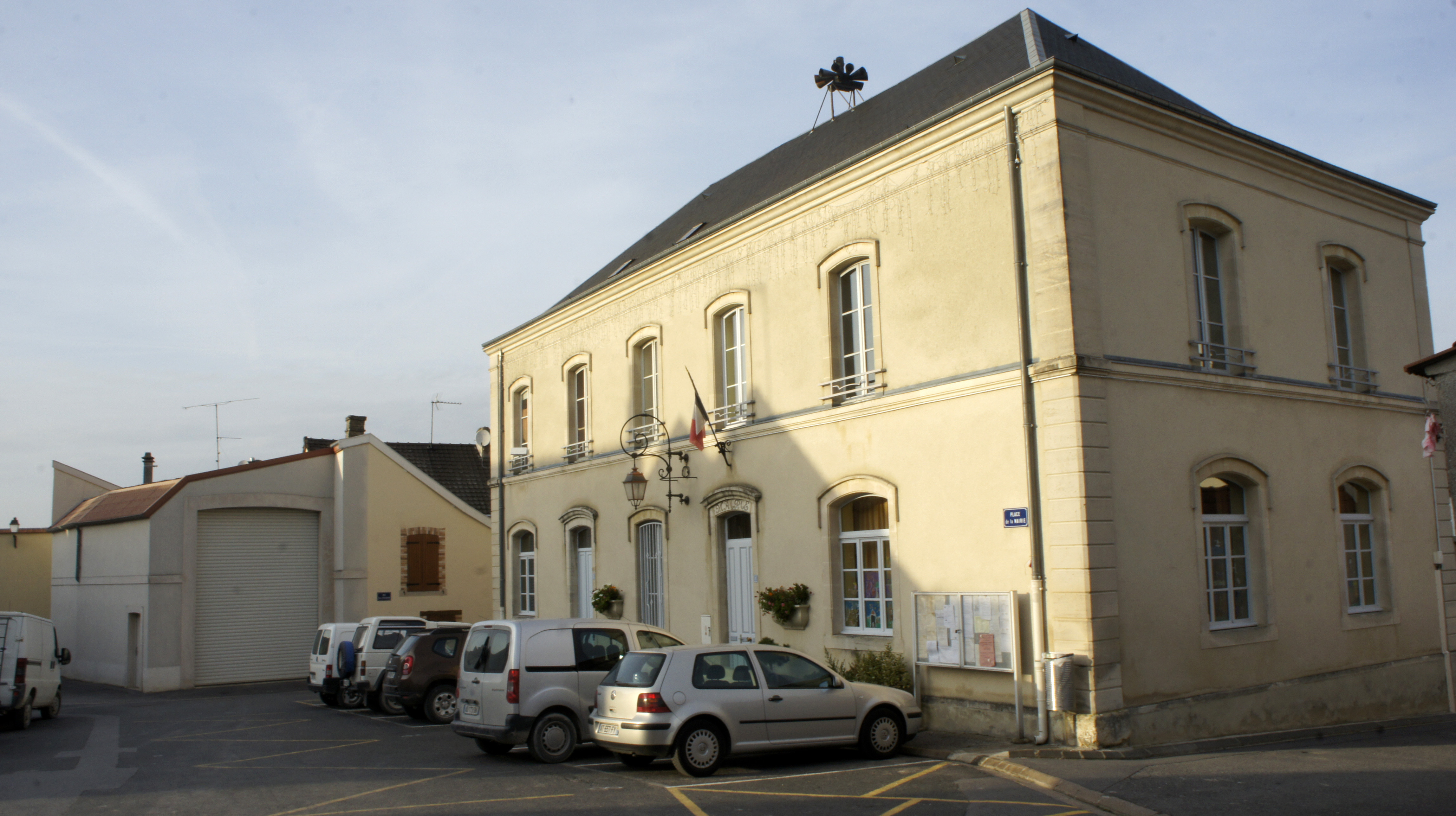 Vue de la place et de la Mairie de Villers Marmery.